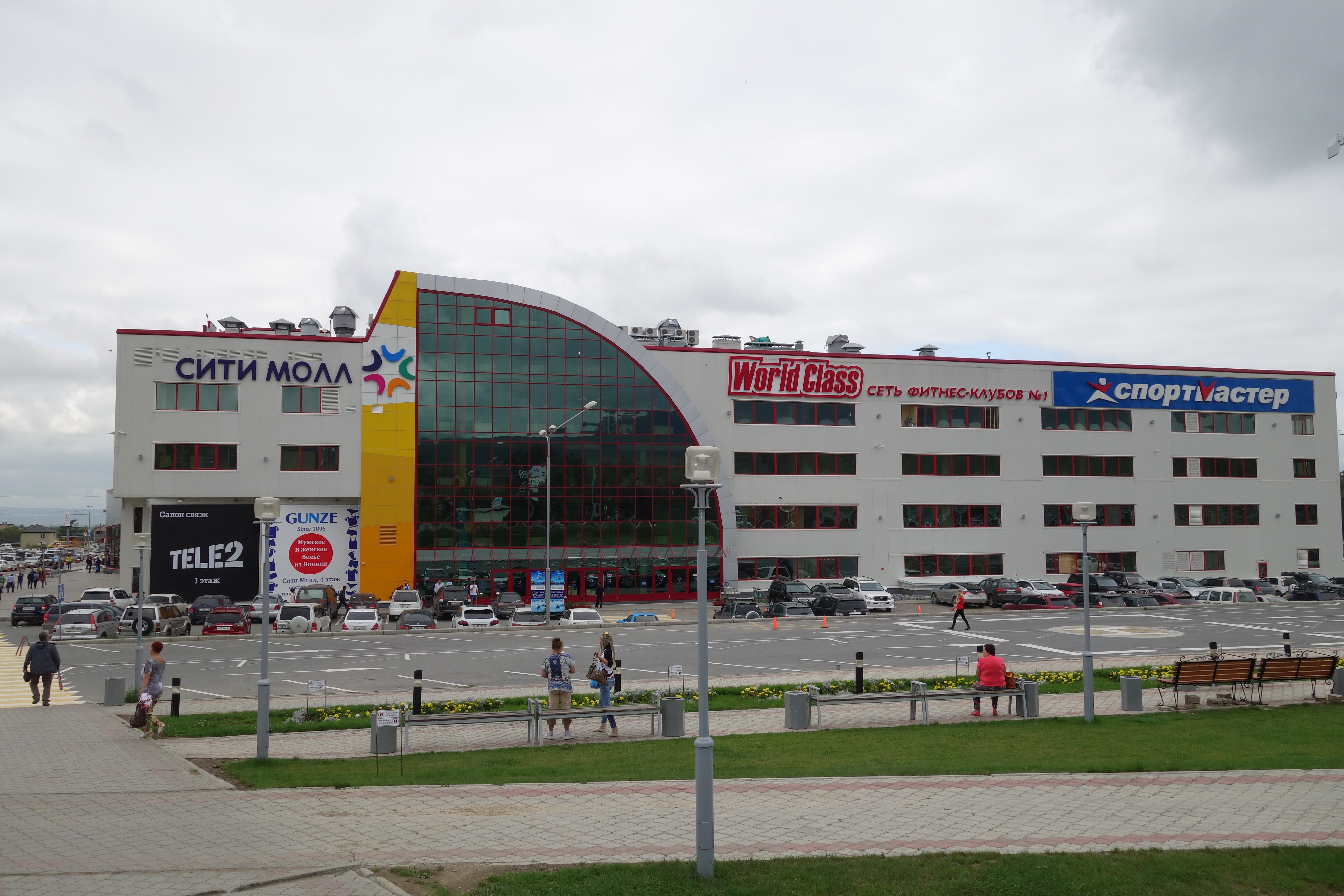 Сити-Молл. Южно-Сахалинск. Крупнейший торгово-развлекательный комплекс на Дальнем Востоке России. 2014 г.